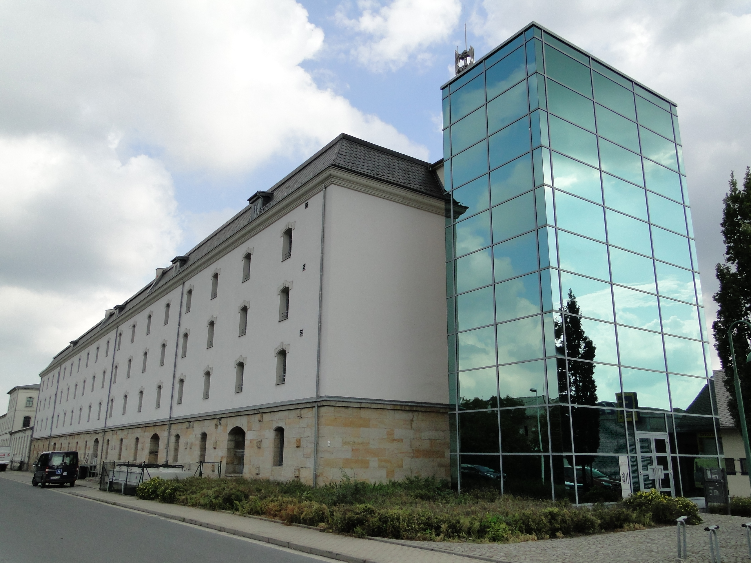 Kulturdenkmal Elisabeth-Boer-Straße 1 Dresden